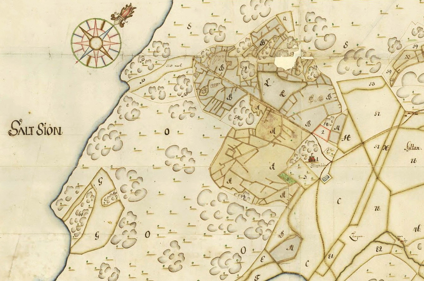 Geometrisk avmätning för "Biursnääs Sätegårdh" 1701